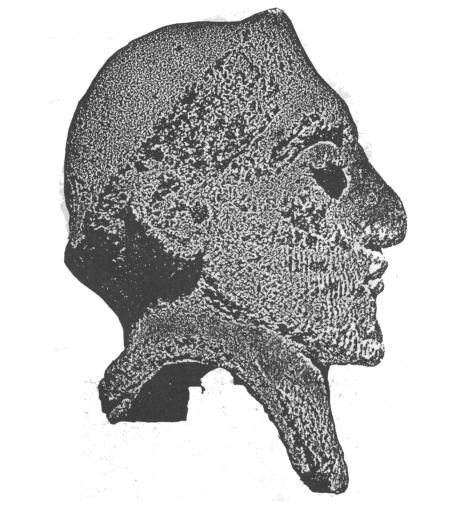 Qutti hökümdarı_Məlikzadənin kitabi